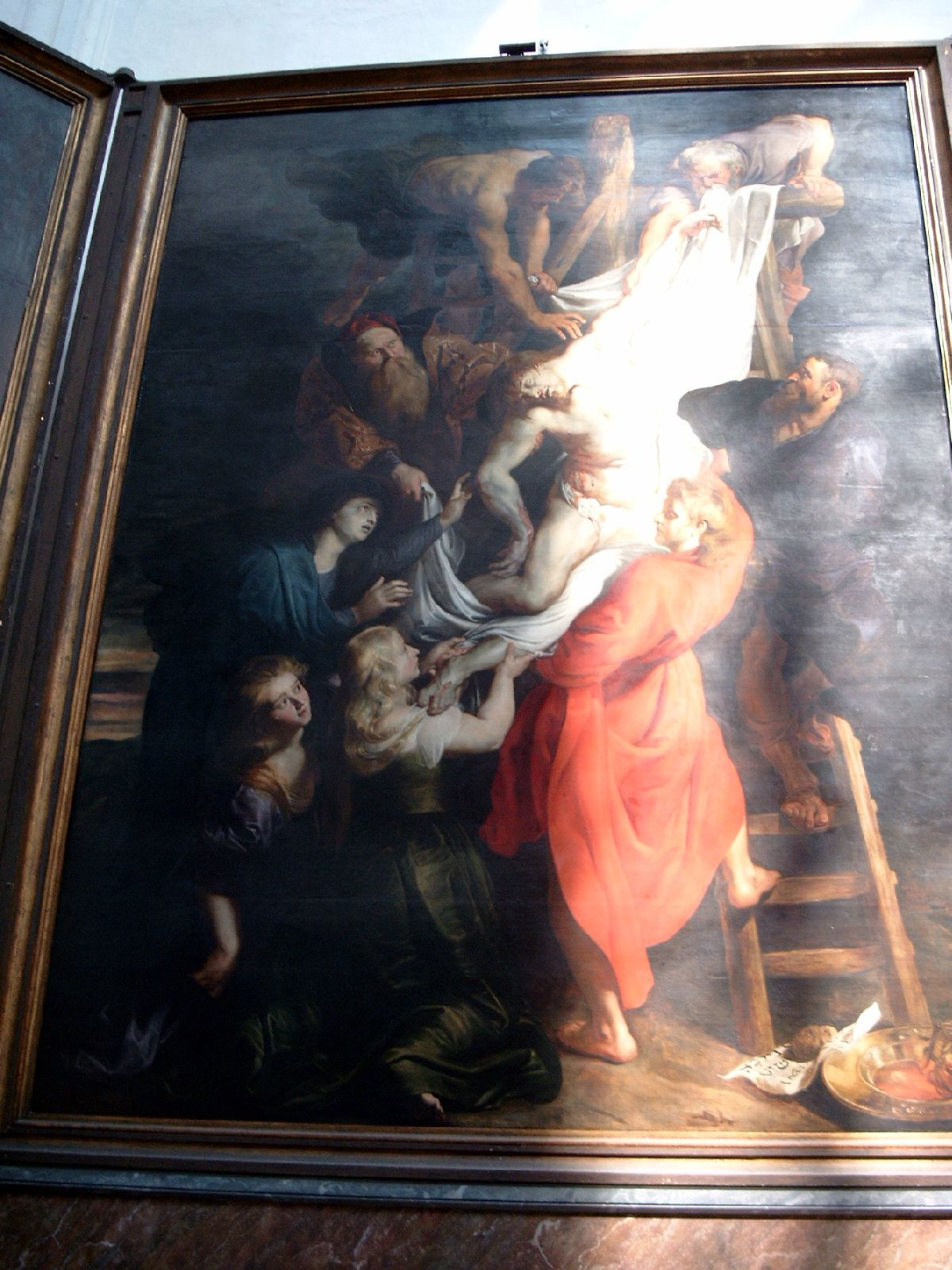 middenpaneel kruisafneming